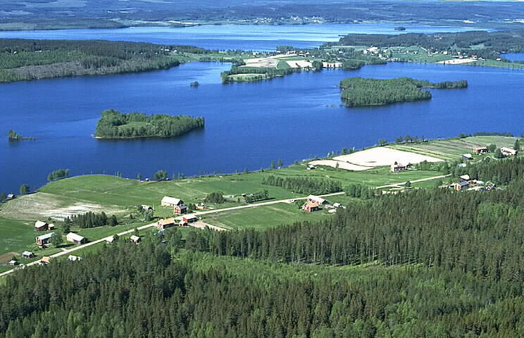 Bygdeträskliden, Kvarnbyn och Västanträsk. Motiv: Byarna runt Bygdeträsket och Göksjön Nyckelord: Flygbilder, Riksintressen Kategori: Insjömiljöer Bygdeträskliden, Kvarnbyn och Västanträsk.